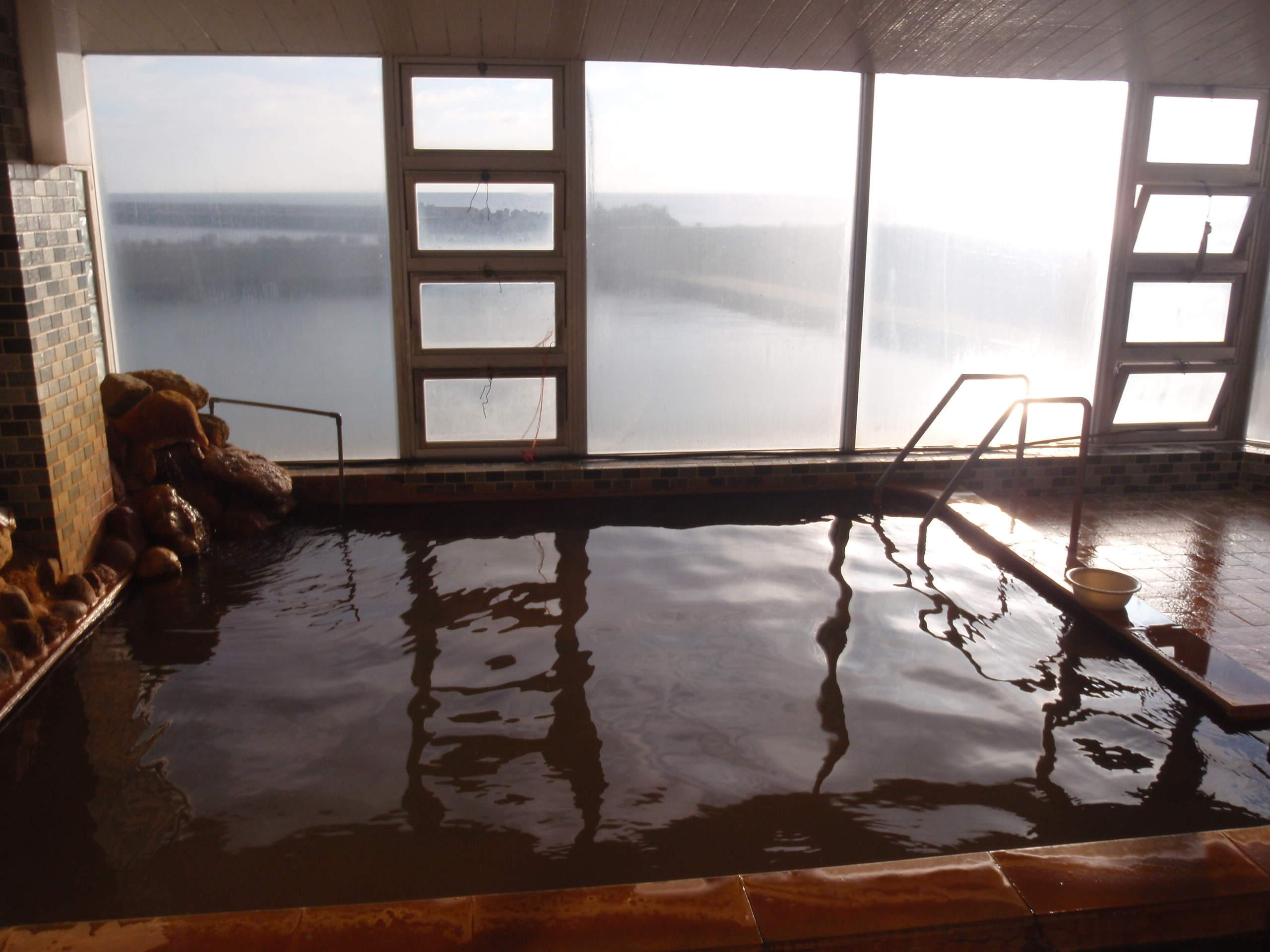 神威脇温泉保養所の浴室から見る神威脇漁港と日本海